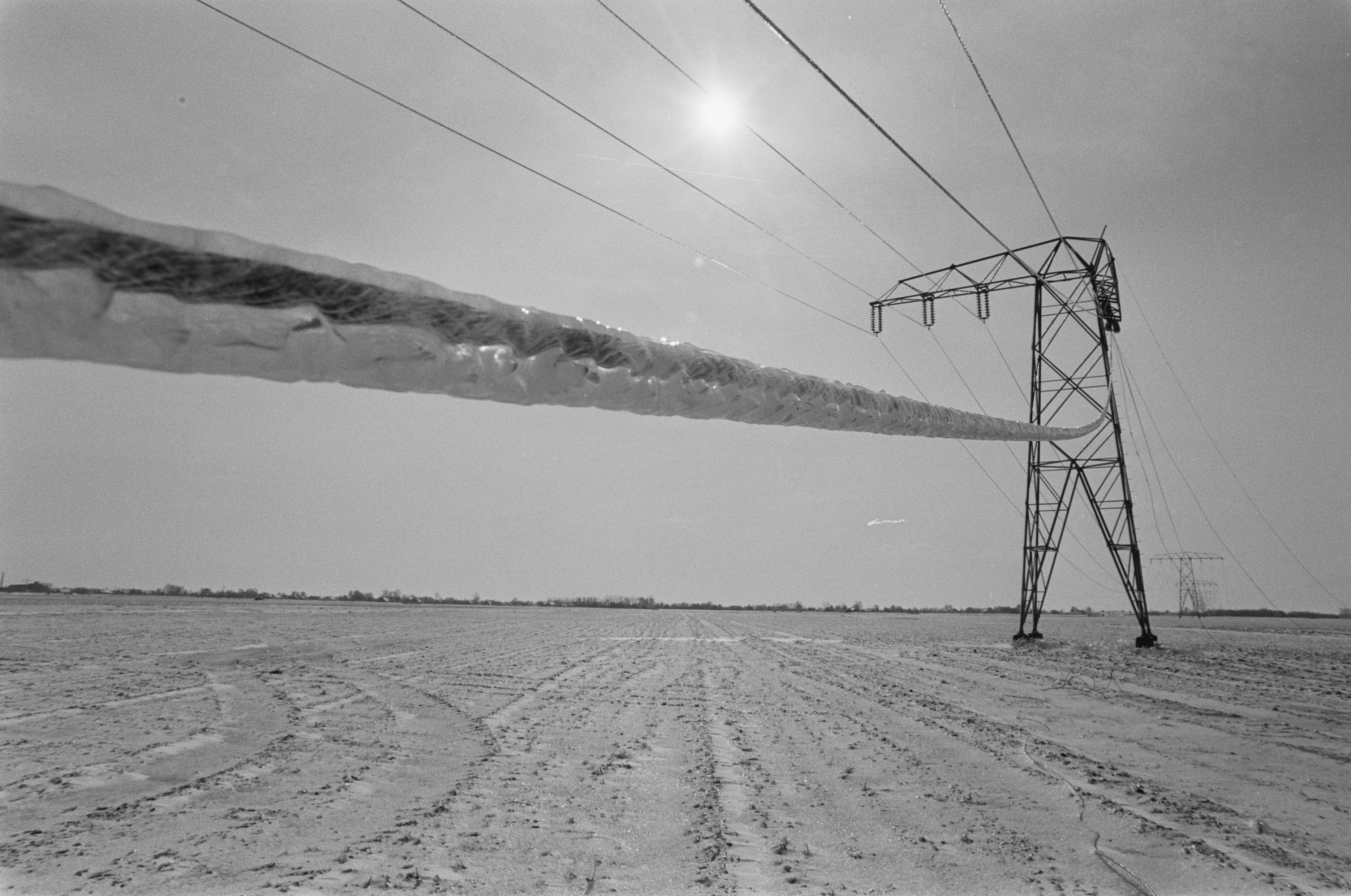 Collectie / Archief : Fotocollectie Anefo Reportage / Serie : [ onbekend ] Beschrijving : Overlast door ijzel in noorden van het land; beijzelde hoogspanningskabel bij Veendam Datum : 3 maart 1987 Locatie : Groningen, Veendam Trefwoorden : IJZEL Fotograaf : Bogaerts, Rob / Anefo Auteursrechthebbende : Nationaal Archief Materiaalsoort : Negatief (zwart/wit) Nummer archiefinventaris : bekijk toegang 2.24.01.05 Bestanddeelnummer : 933-9106